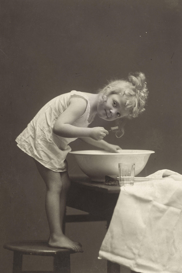 Ein anonymes Mädchen beim Zähneputzen, Wien, um 1915.